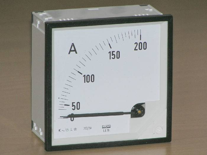 Amperomierz tablicowy elektromagnetyczny; Producent: LUMEL; Typ: EA19; Klasa: 1,5; przeznaczony do pomiaru prądu przemiennego z przekładnikiem prądowym 200/5A, wyskalowany dla wartości prądu pierwotnego.